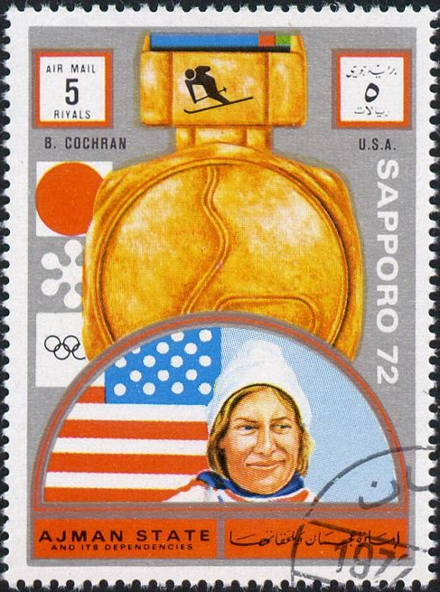 Barbara Cochran